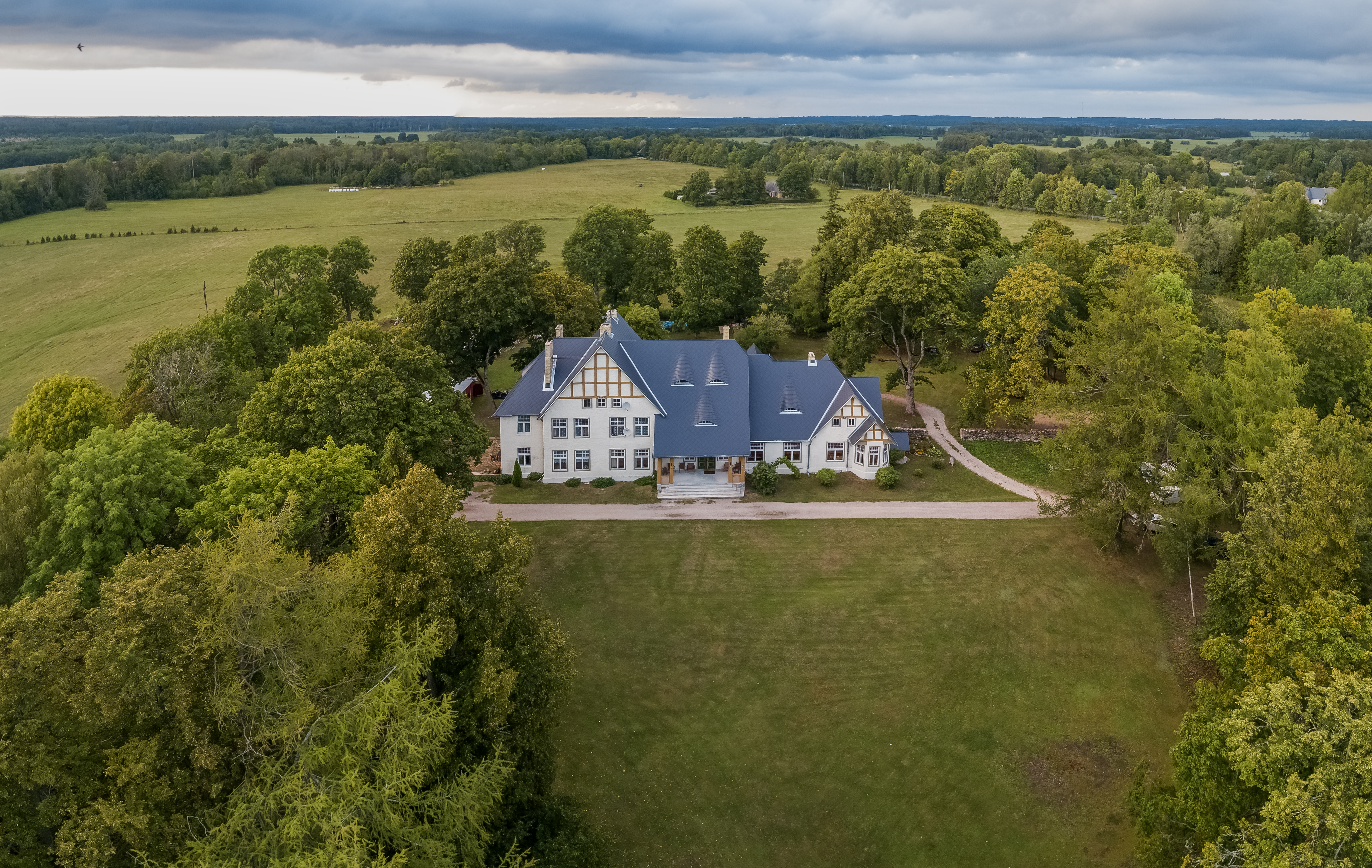 Illuste mõis